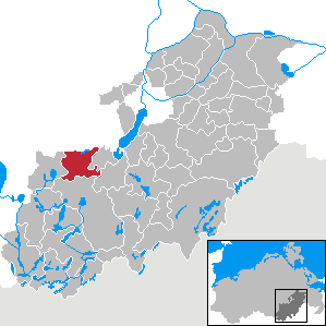 Klein Vielen in Mecklenburg-Vorpommern, Landkreis Mecklenburg-Strelitz